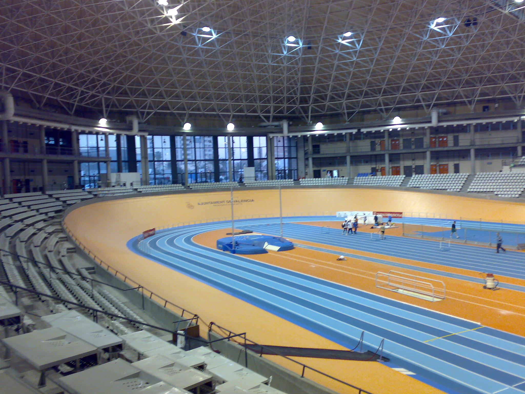 Sede del XII Campeonato del Mundo de Atletismo en pista cubierta, Valencia 2008 - Luis Puig Palace - Palacio Velódromo Luis Puig